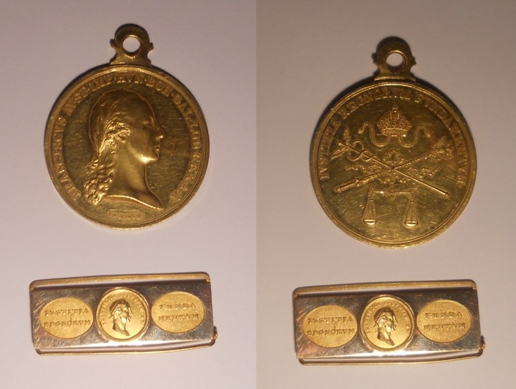 Zivil-Ehrenmedaille in Gold Verleihungszeitraum am Oer mit Band